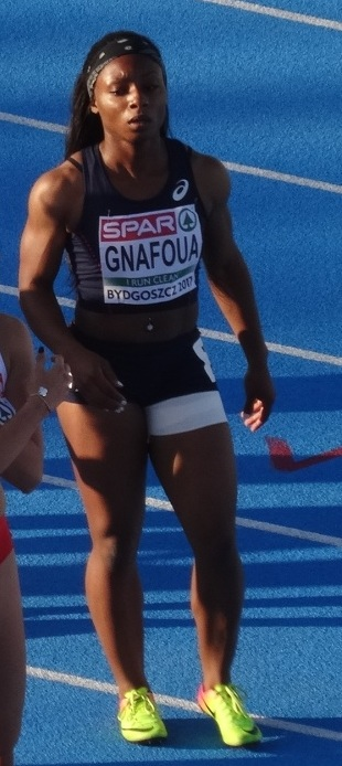 Młodzieżowe Mistrzostwa Europy w Lekkoatletyce U23 w Bydgoszczy 13-16 lipca 2017, półfinał biegu na 100 m kobiet